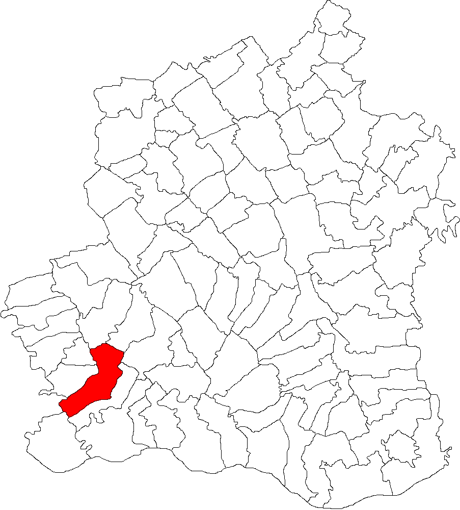 Categorie:Hărţi ale judeţului Teleorman